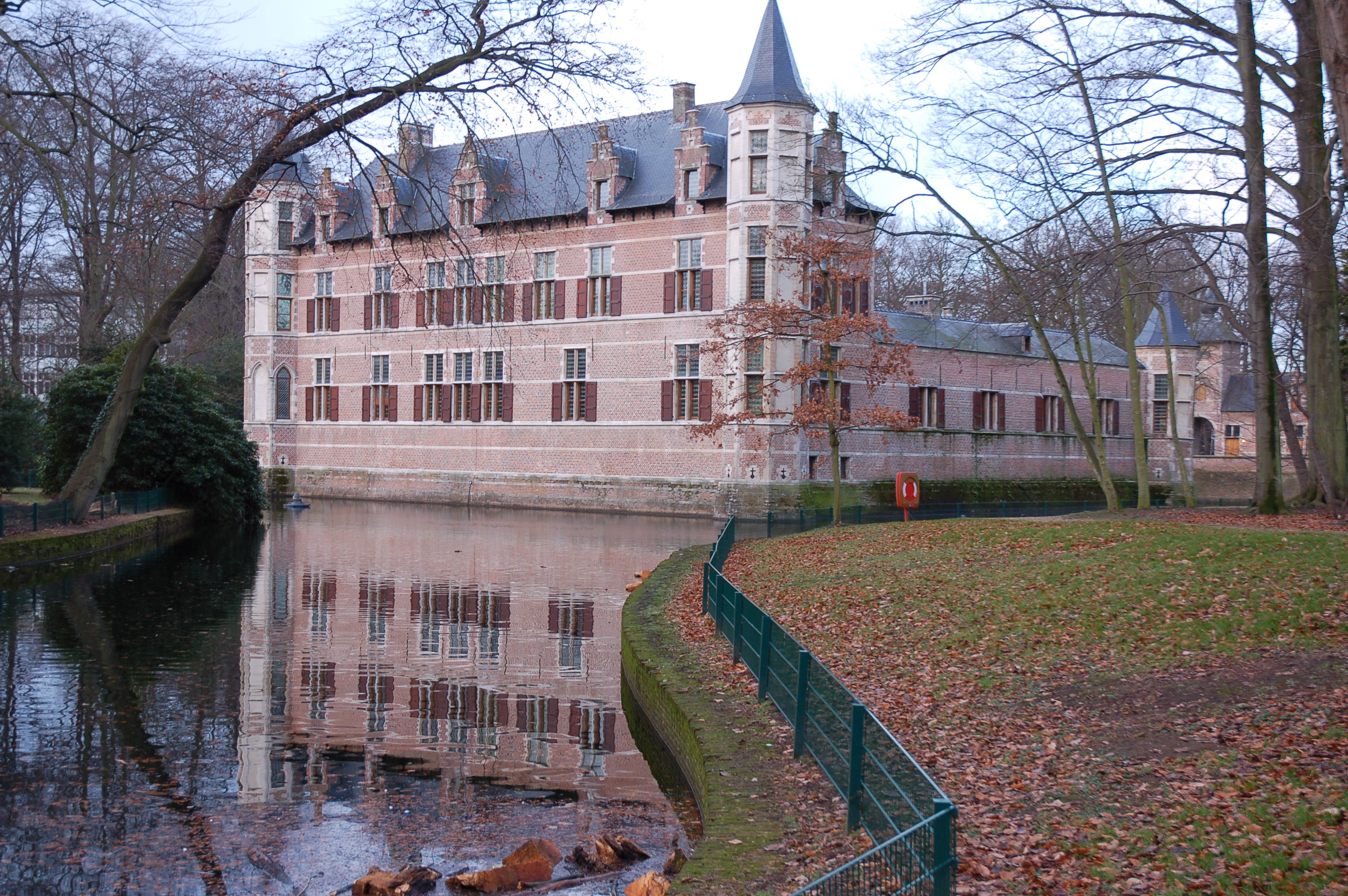 Antwerpen, district Ekeren. Hof van Veltwijck, thans districtshuis.